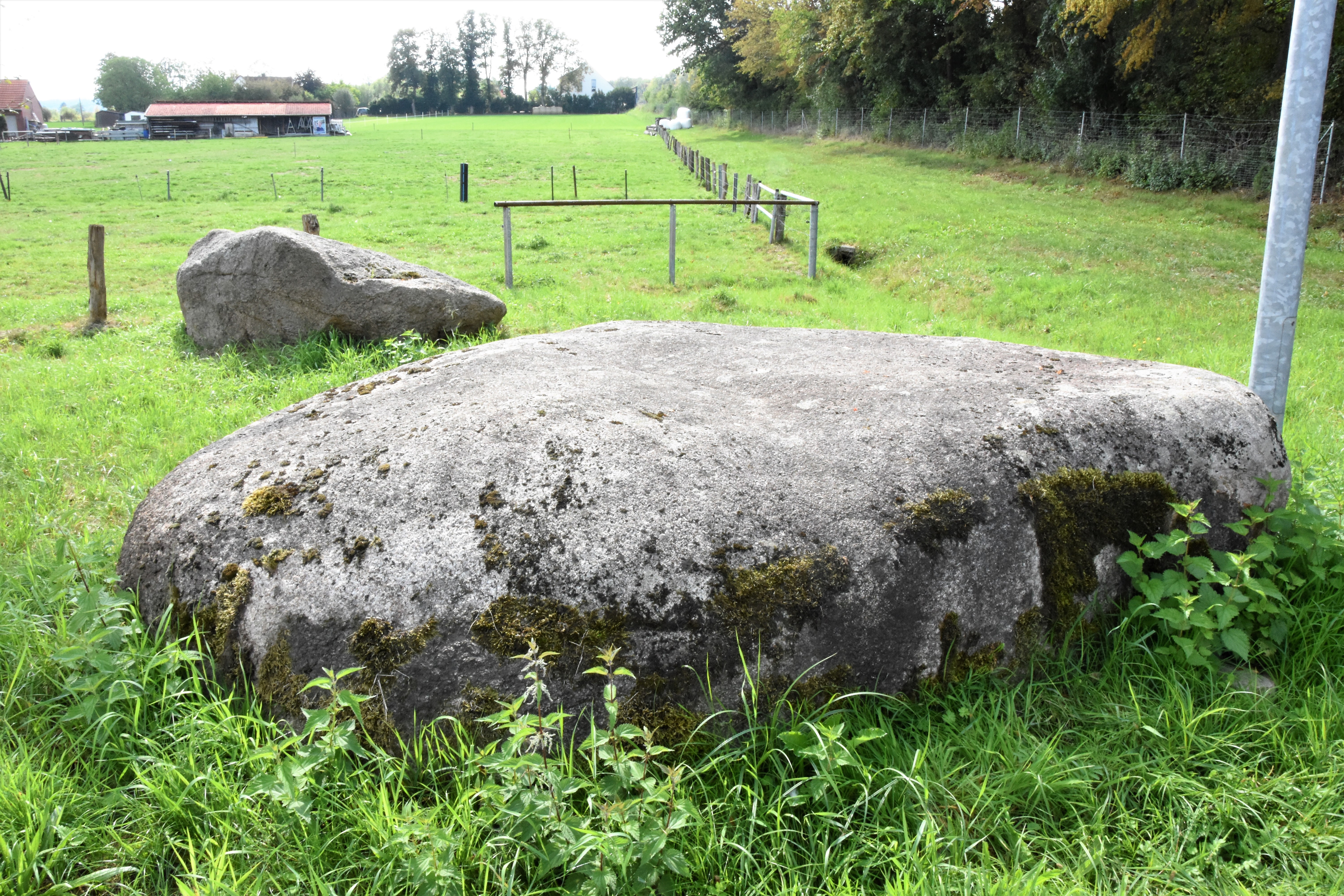 ND OS 00052 Findling „Hexenstein“ in Wallenhorst am Vogelpohle. in direkter Nähe zur Bundesautobahn 1 und der Bundesstraße 68.